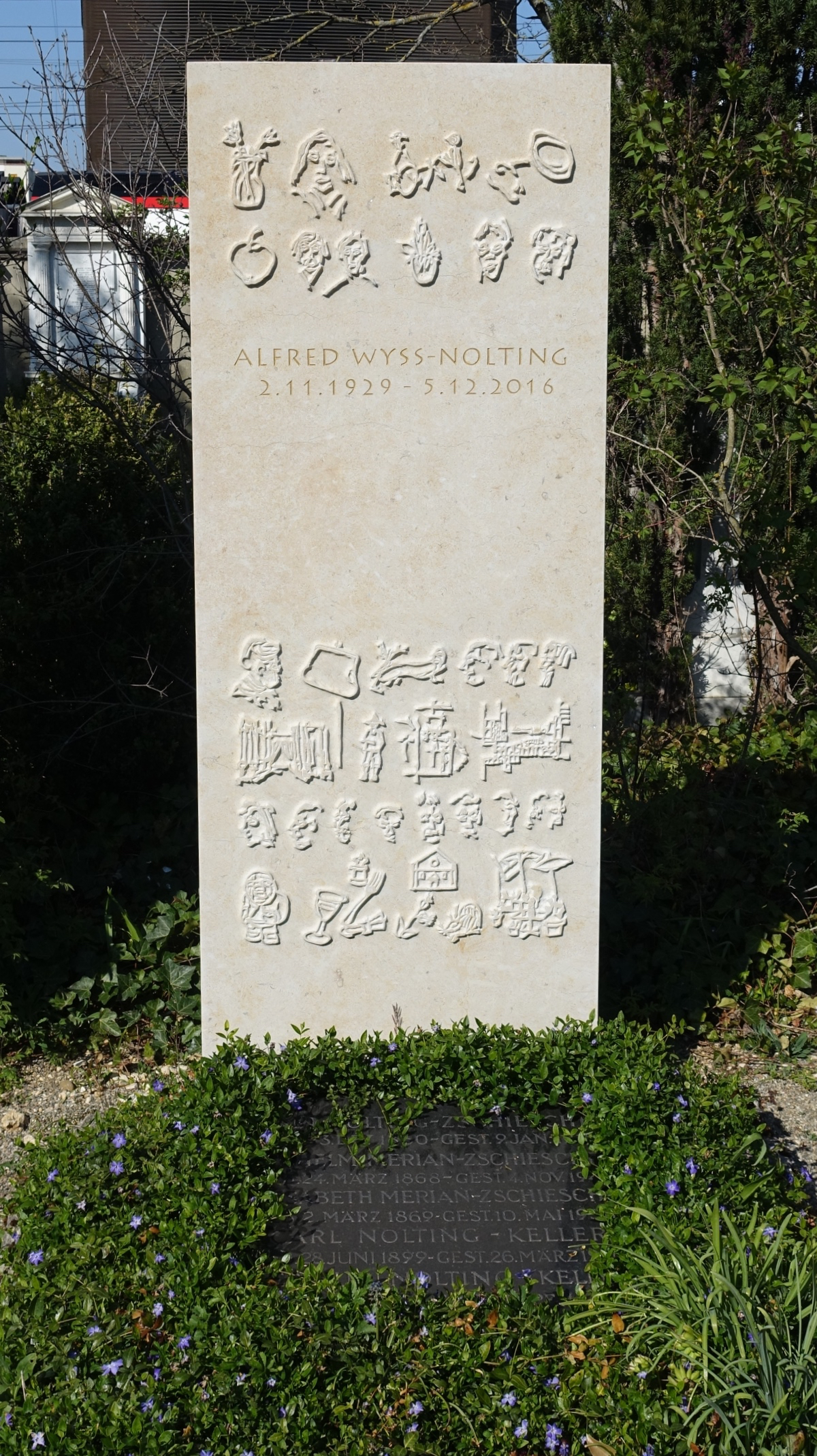 Alfred Wyss-Nolting (1929–2016) Kunsthistoriker, Denkmalpfleger. Familiengrab Friedhof Wolfgottesacker, Basel